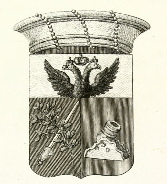 Герб рода баронов Меллеров-Закомельских